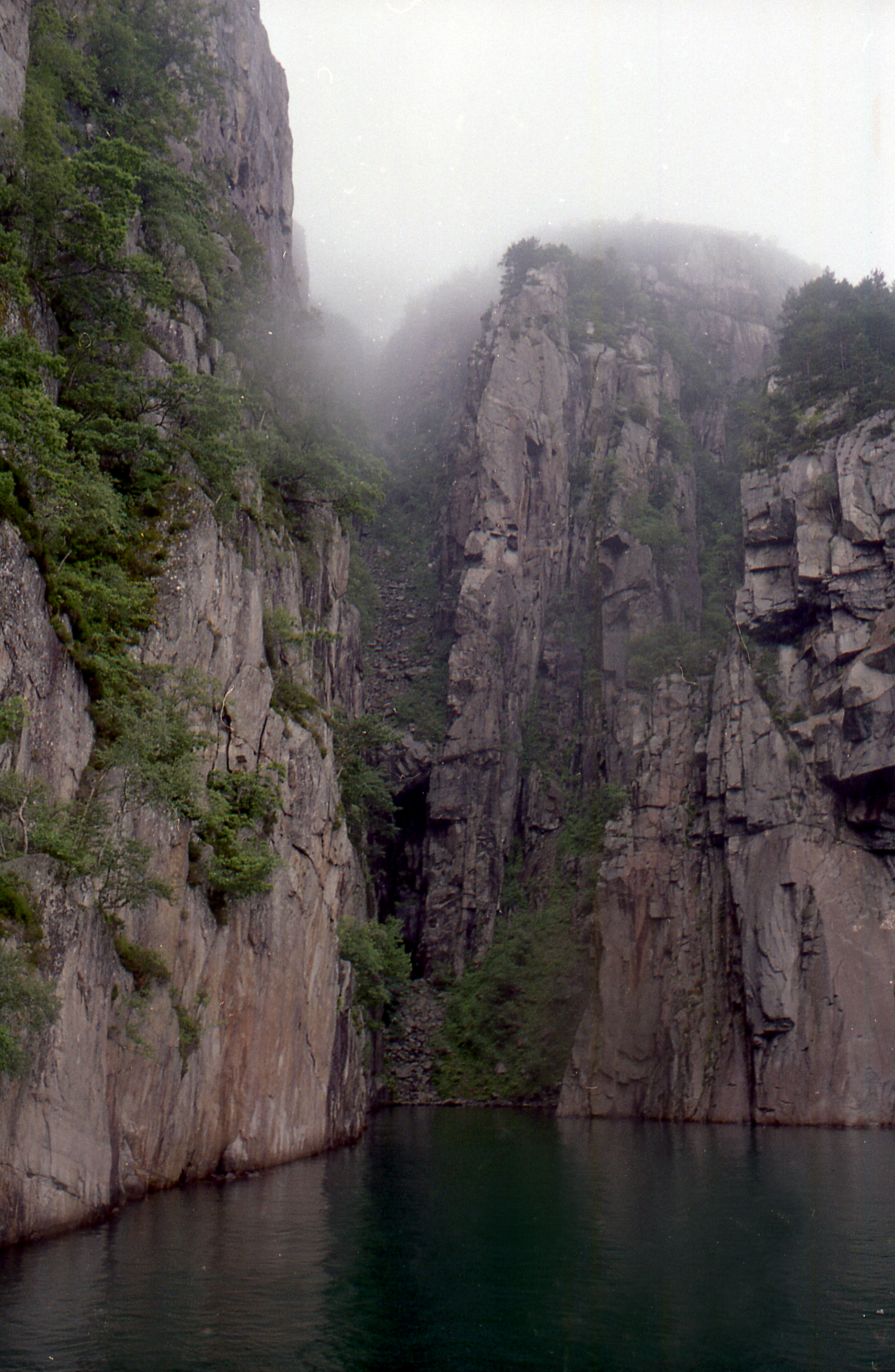 Северный берег_Люсе-фиорда."Бухта контрабандистов"